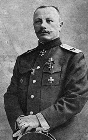 Вице-адмирал Андрей Георгиевич Покровский